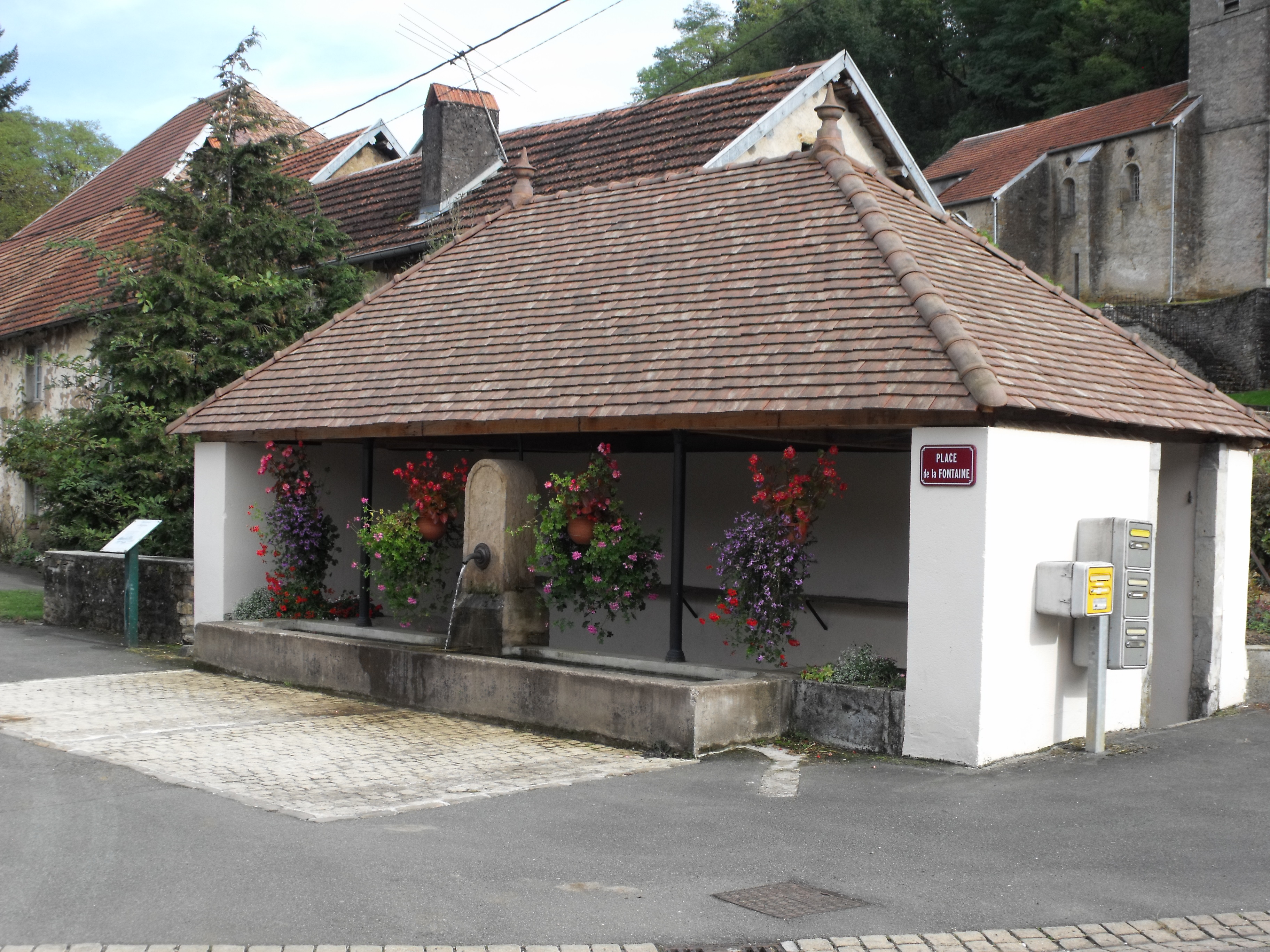 Fontaine à Rognon, Doubs, France